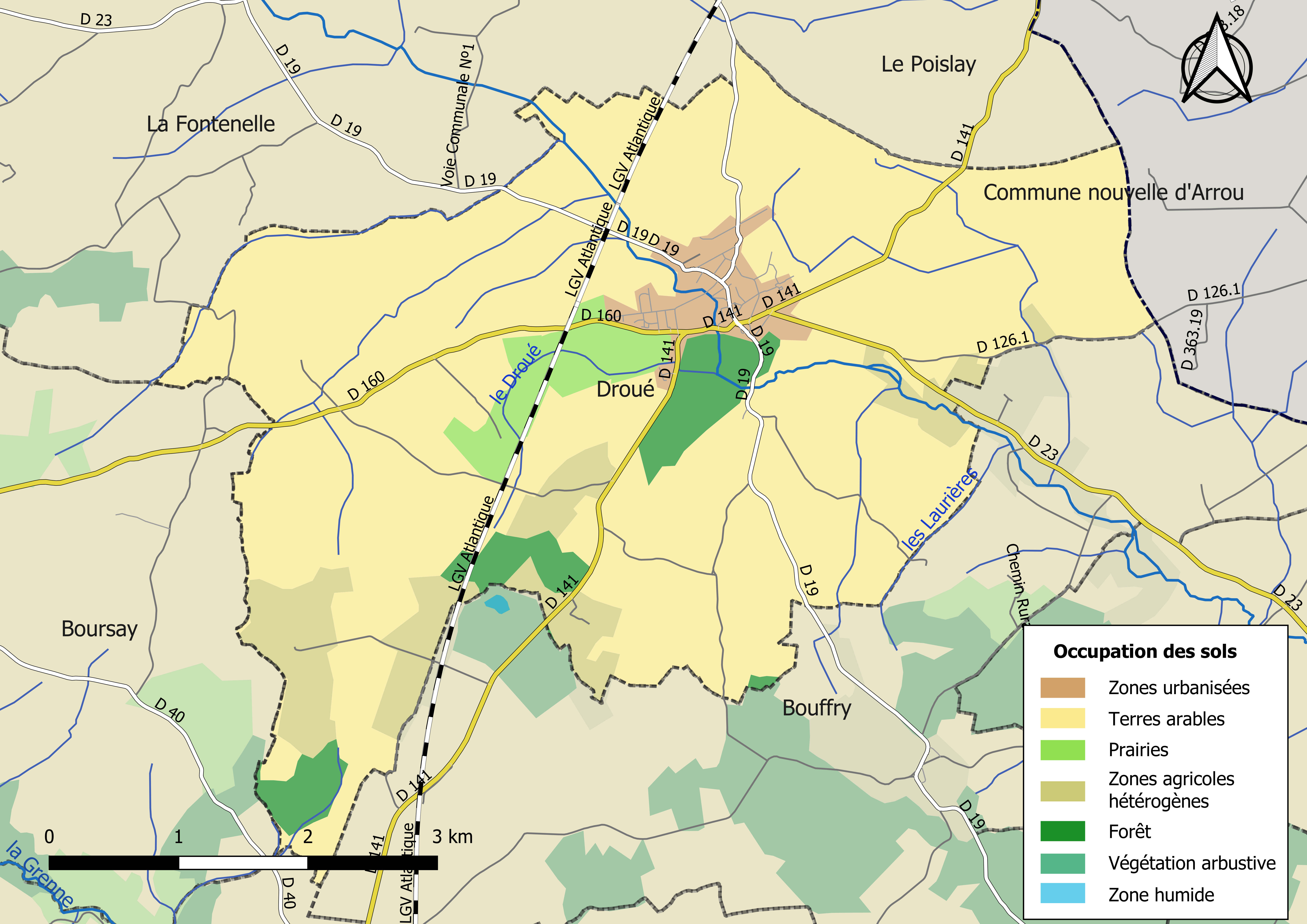 Carte des infrastructures et de l’occupation des sols en 2018 de la commune de Droué (France).